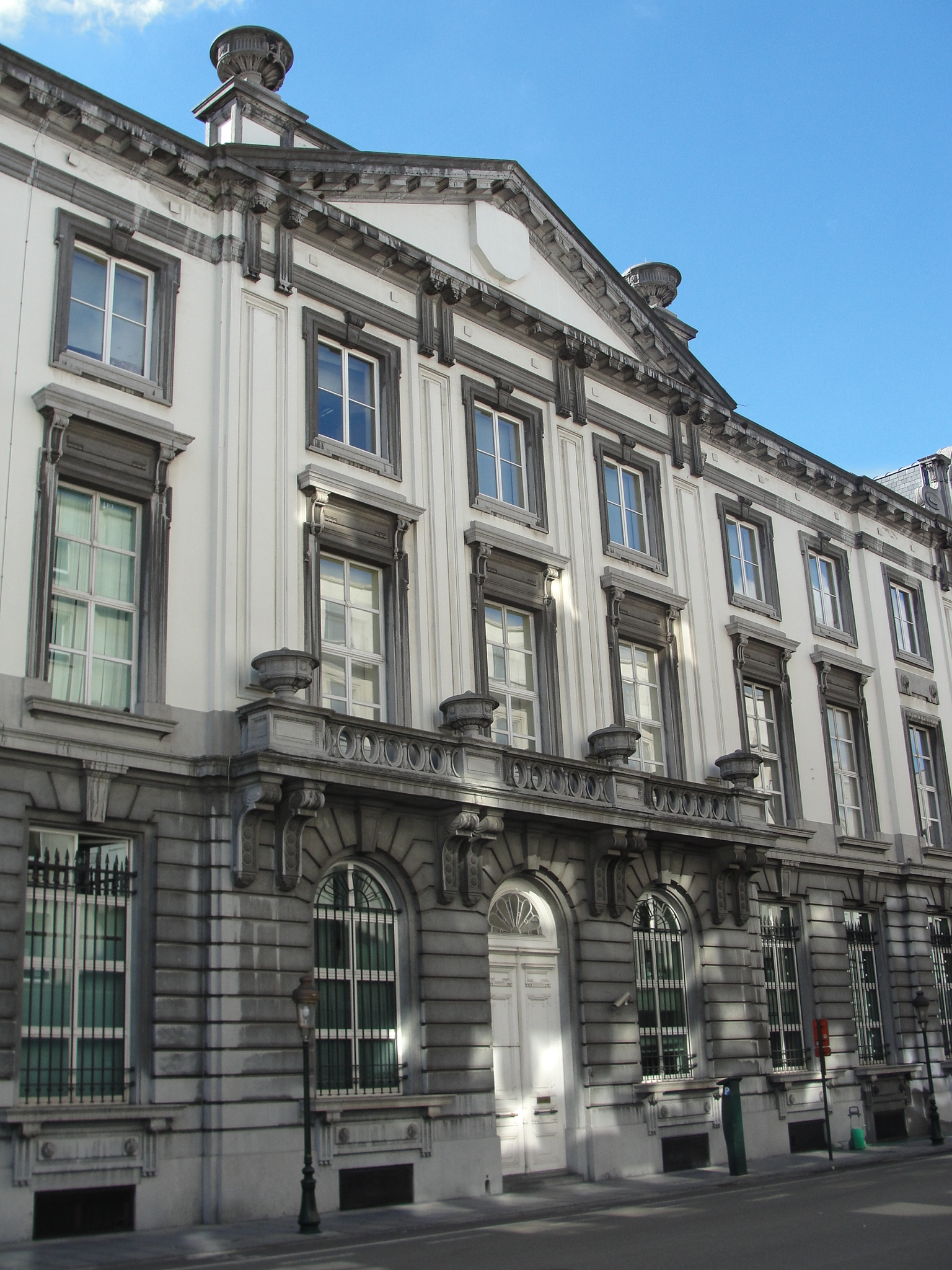 Gebouw van de Kanselarij van de Eerste Minister, zijde Hertogsstraat: middenrisaliet.